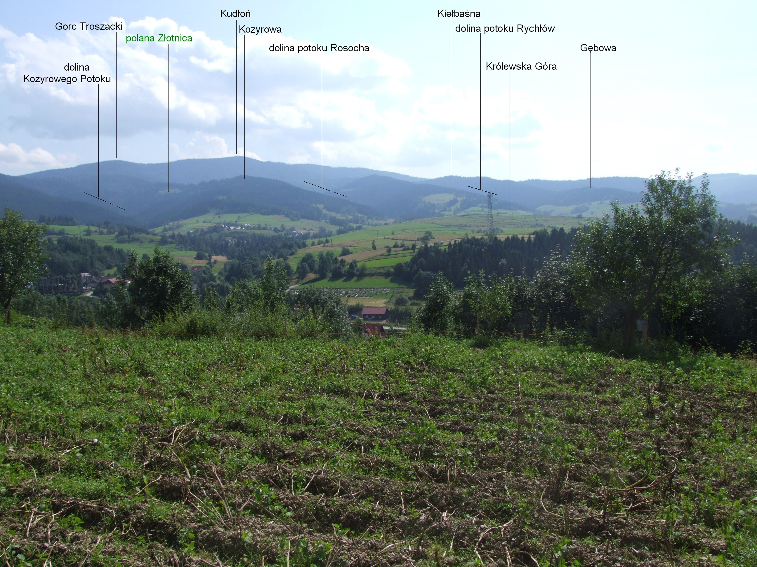 Widok z Cyrkowej Góry na Gorce